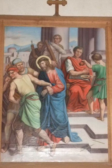 Pfarrkirche St. Georg, Bermatingen, Bodenseekreis Kreuzwegstation (Nazarener-Stil)